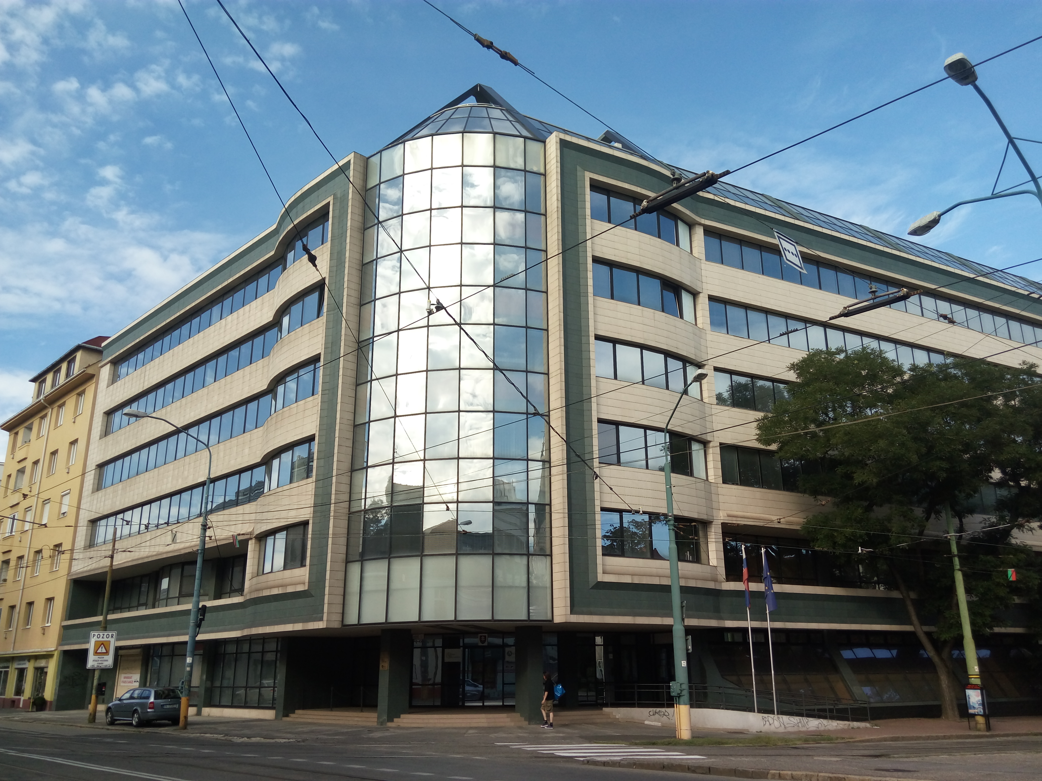 Radlinského 32, Staré Mesto, Bratislava